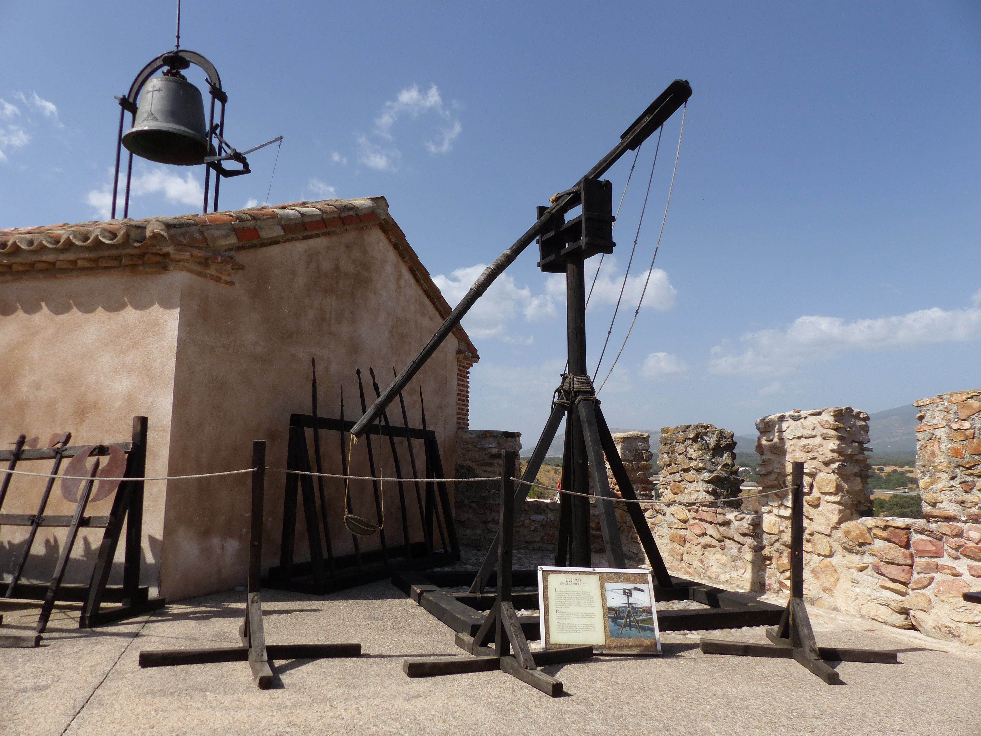 Máquinas de asedio de Buitrago del Lozoya